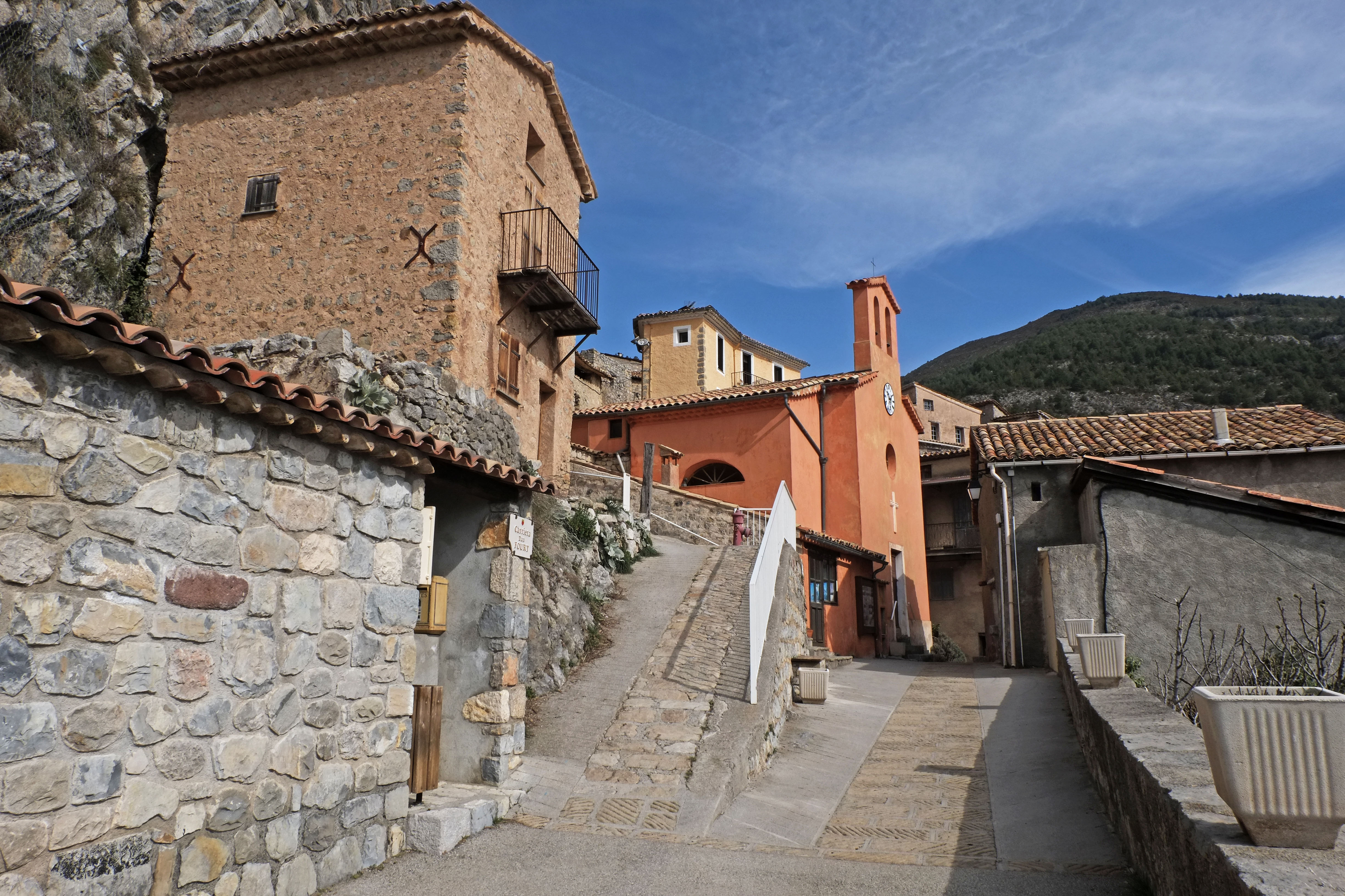 Vue du village d'Auvare en arrivant